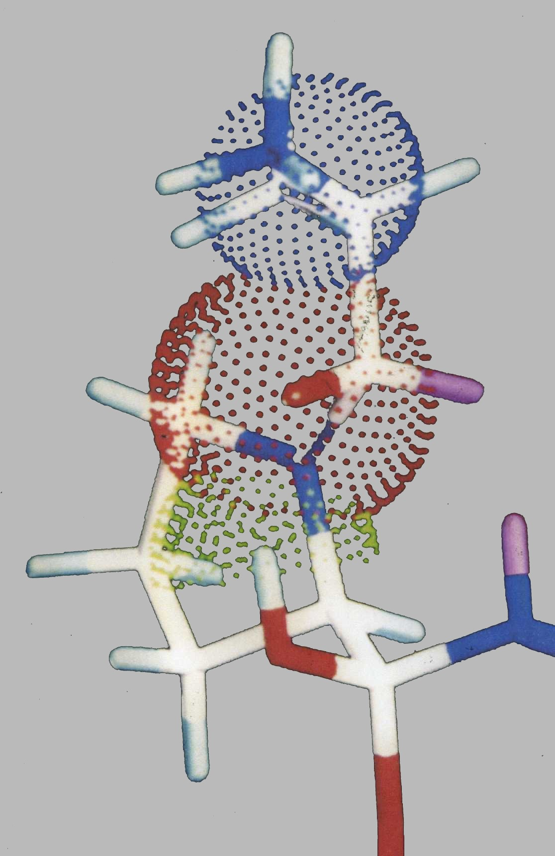 Hypothetisches Schema in tetraedrisches Intermediat 1